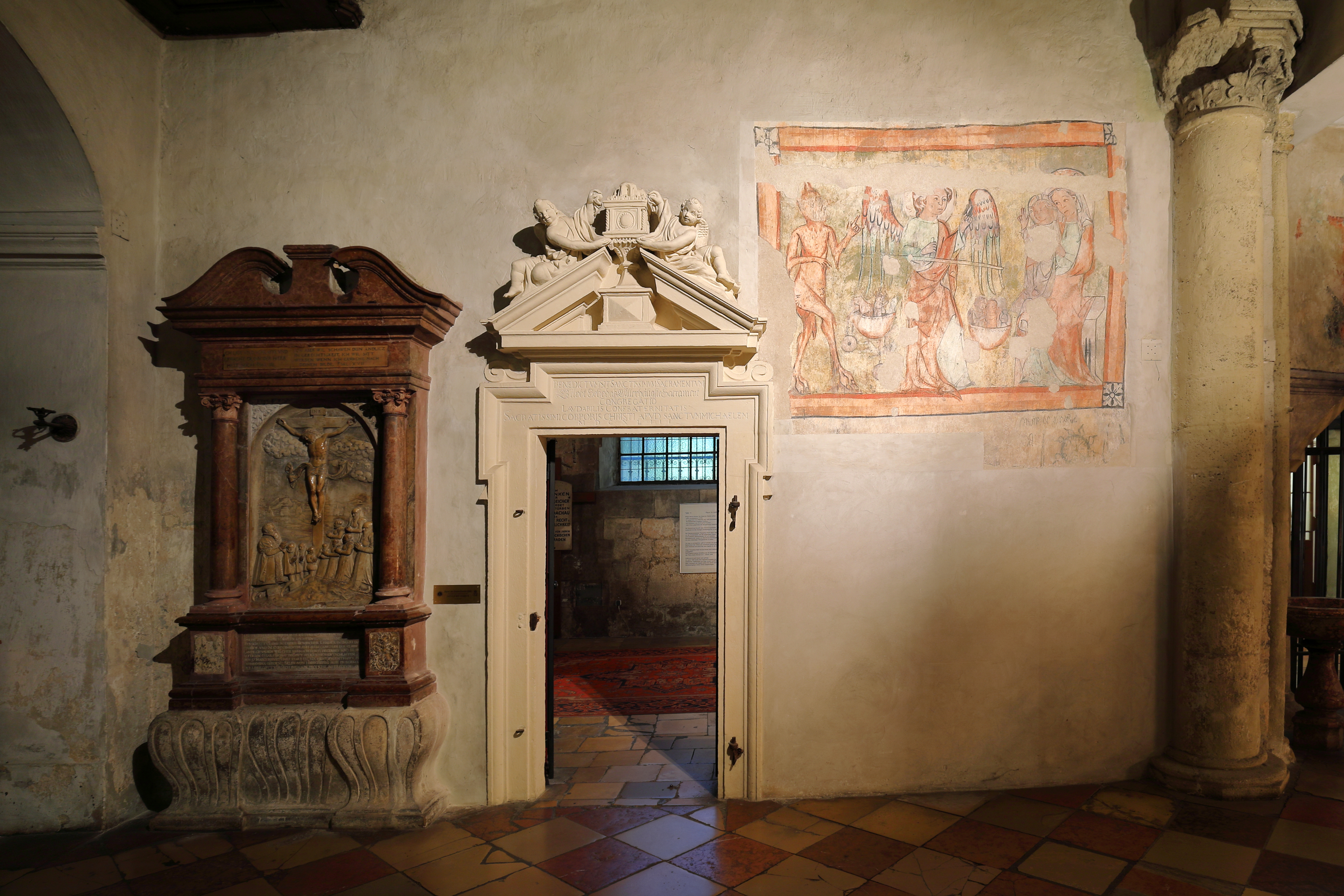 Eingangsbereich der Turmkapelle in der Michaelerkirche im 1. Bezirk der österreichischen Bundeshauptstadt Wien.In der Bildmitte der Eingang zur Turmkapelle mit dem Giebelschmuck, datiert mit 1643. Rechts des Einganges ein Fresko, das den hl. Michael als Seelenwäger zwischen Maria mit dem Kind als Fürsprecherin und Satan als Ankläger darstellt und um 1350 entstand.Die heutige Pfarr- und Klosterkirche der Salvatorianer wurde 1220 errichtet und war bereits 1288 einer der 3 Stadtpfarrkirchen. Nach mehreren Großbränden und einem Erdbeben wurde die Kirche mehrfach umgebaut.